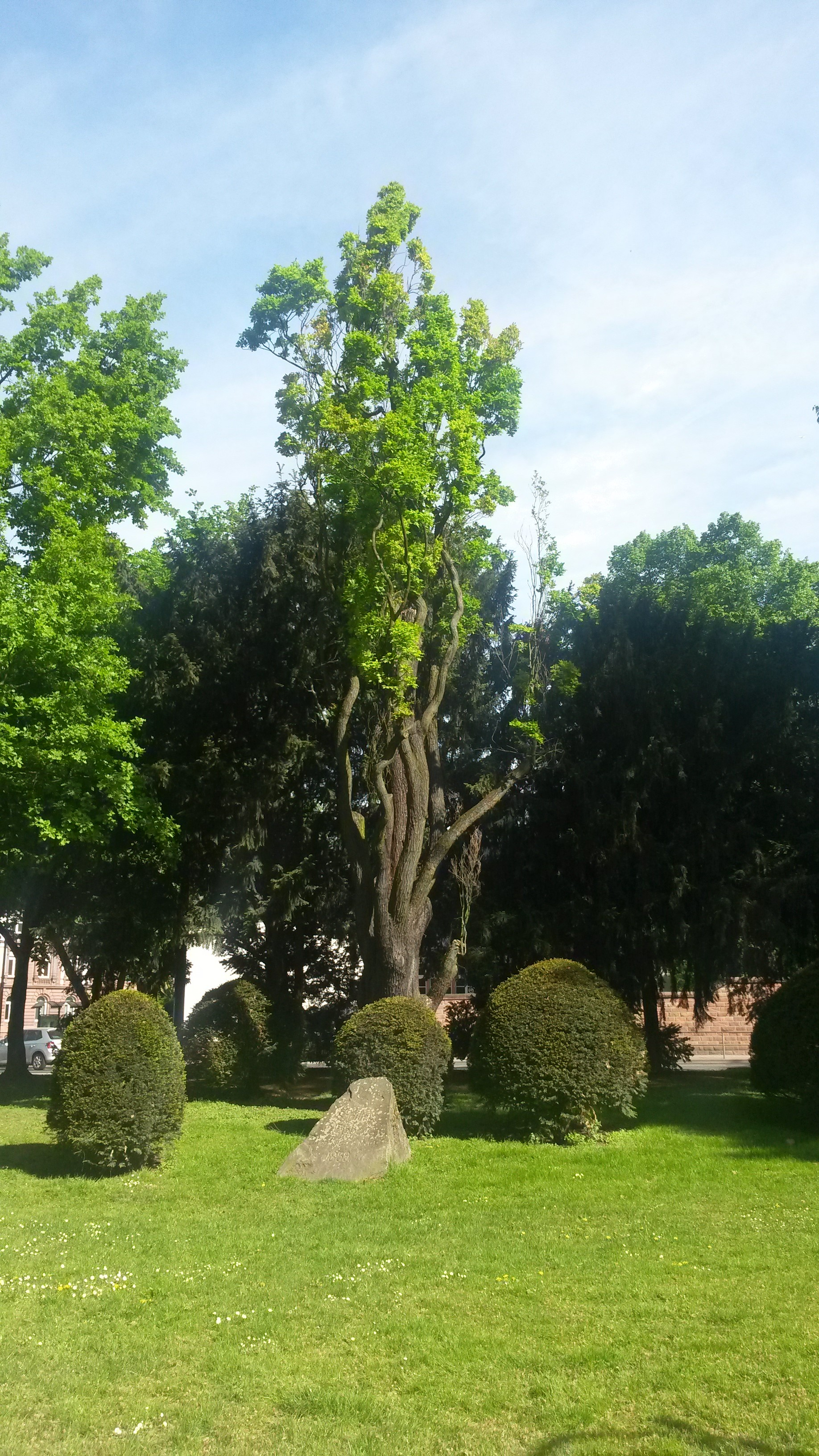 Frankfurt, Schillereiche